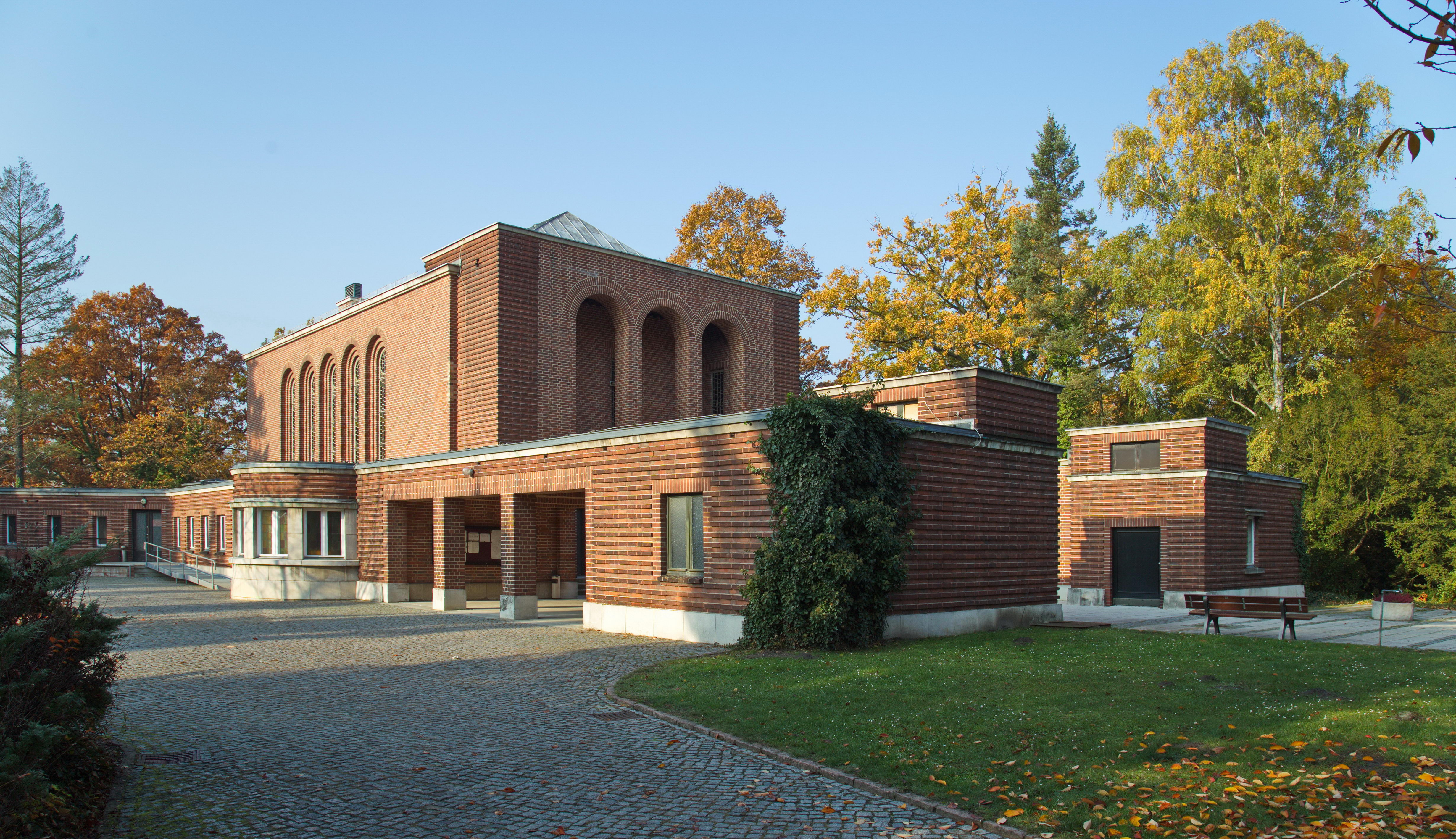 Trauerhalle auf dem Hauptfriedhof,Die Feierhalle mit Krematorium wurde 1929/1930 vom Frankfurter Stadtbaumeister Josef Gesing erbaut.